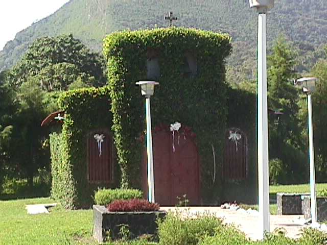 San Agustín, estado Monagas - Venezuela (1998)